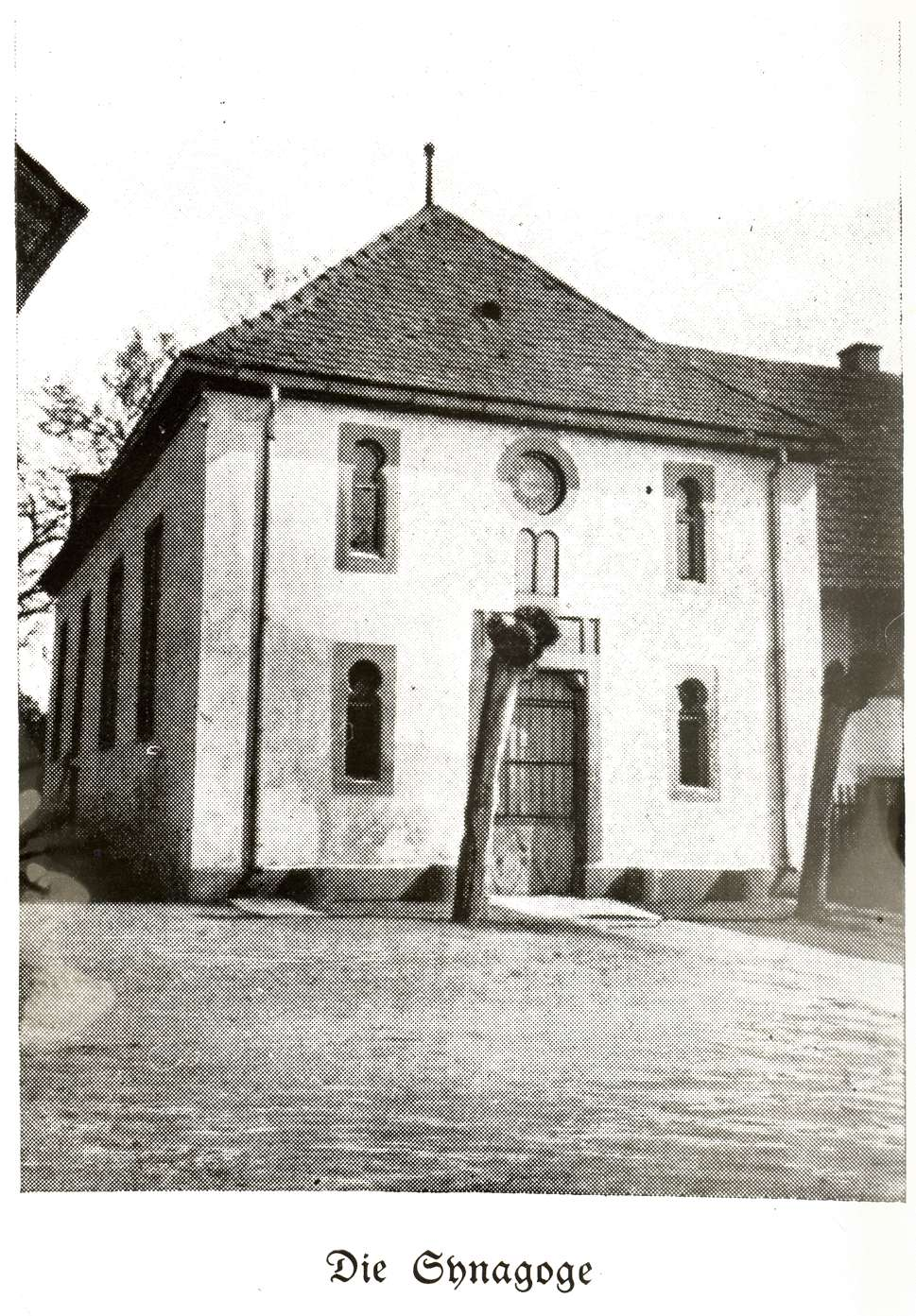 Synagoge (Nonnenweier) Nutzungsbedingungen ausdrücklich auch für Wikipedia (siehe: [1]